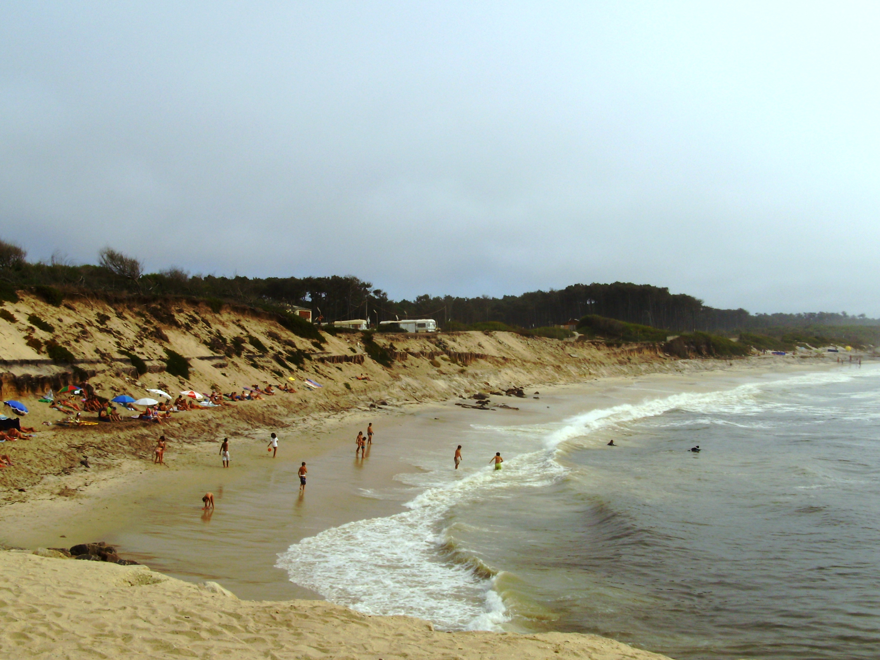 Praia de São Pedro da Maceda, concelho de Ovar, distrito de Aveiro, Portugal.